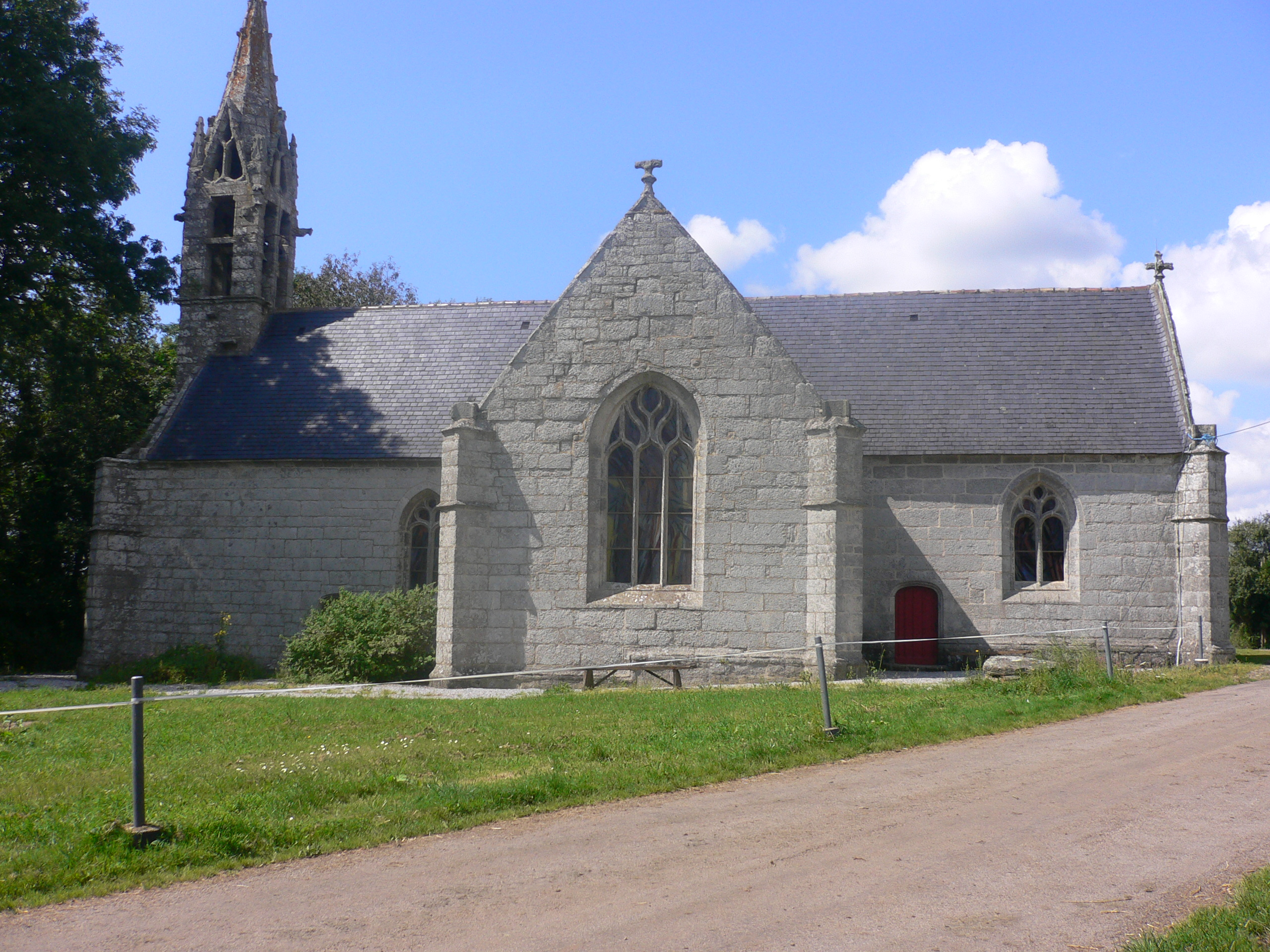 Chapelle Saint-Antoine en Guiscriff, Morbihan, Bretagne, France.